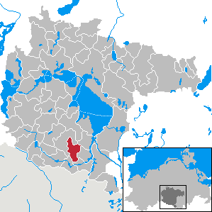 Melz im Landkreis Müritz, Mecklenburg-Vorpommern